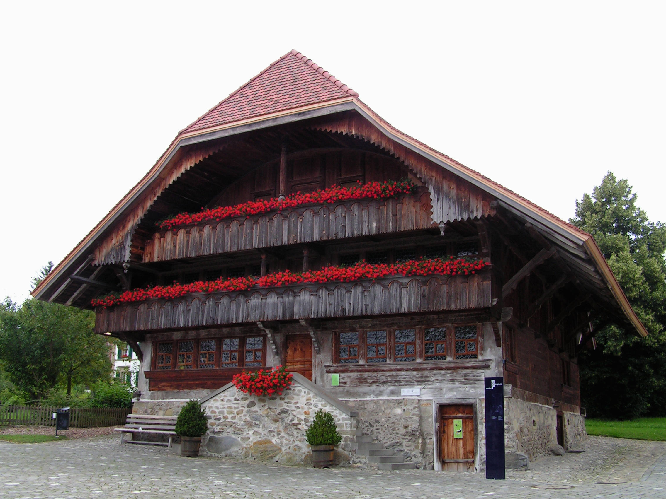 Kirchweg 2, Tafers. Sigristenhaus. Sensler Museum.